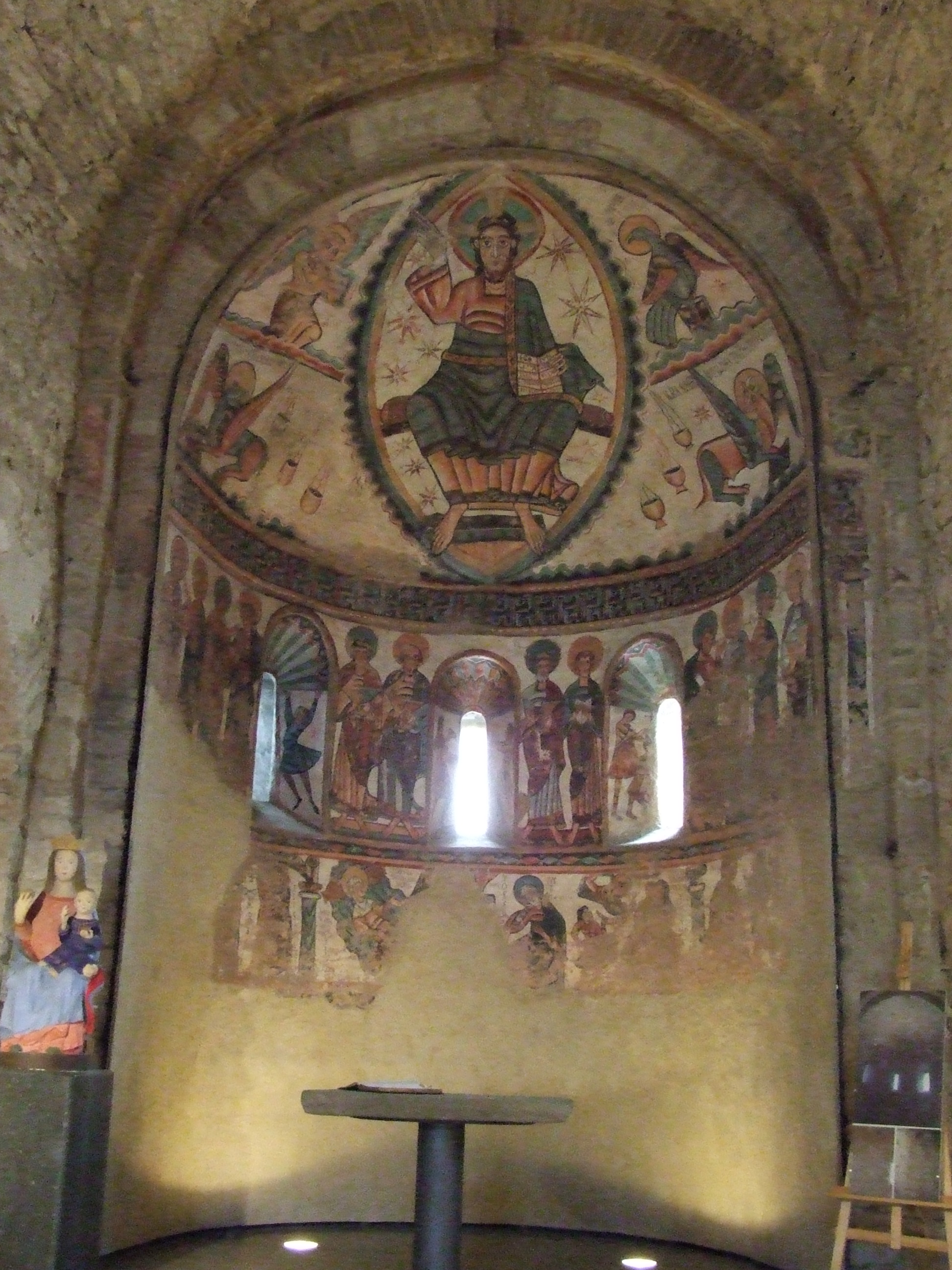 Pintures de l'absis central. Conjunt (Santa Maria de Mur, Castell de Mur, Pallars Jussà)